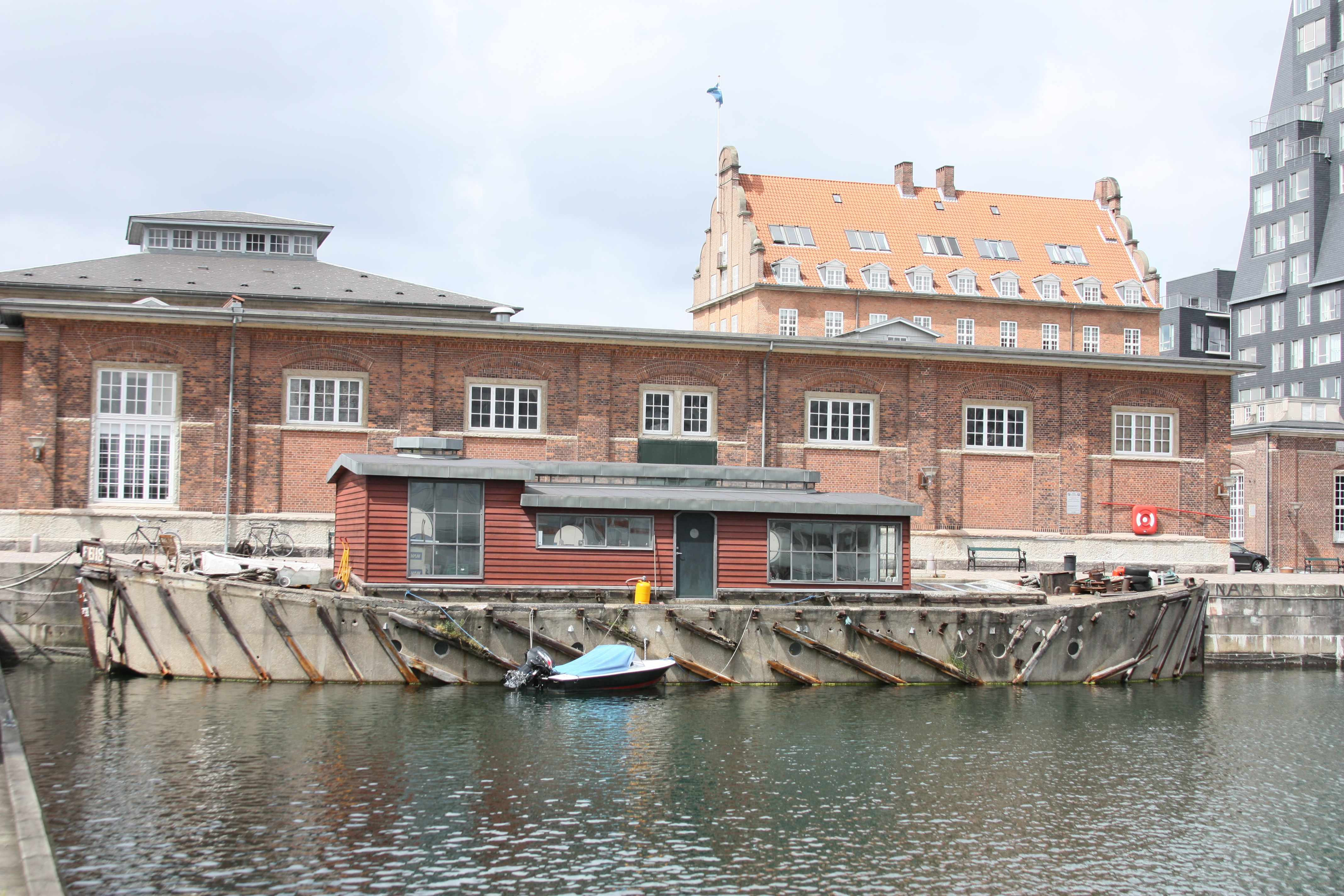 Betonschiff in Kopenhagen 2009